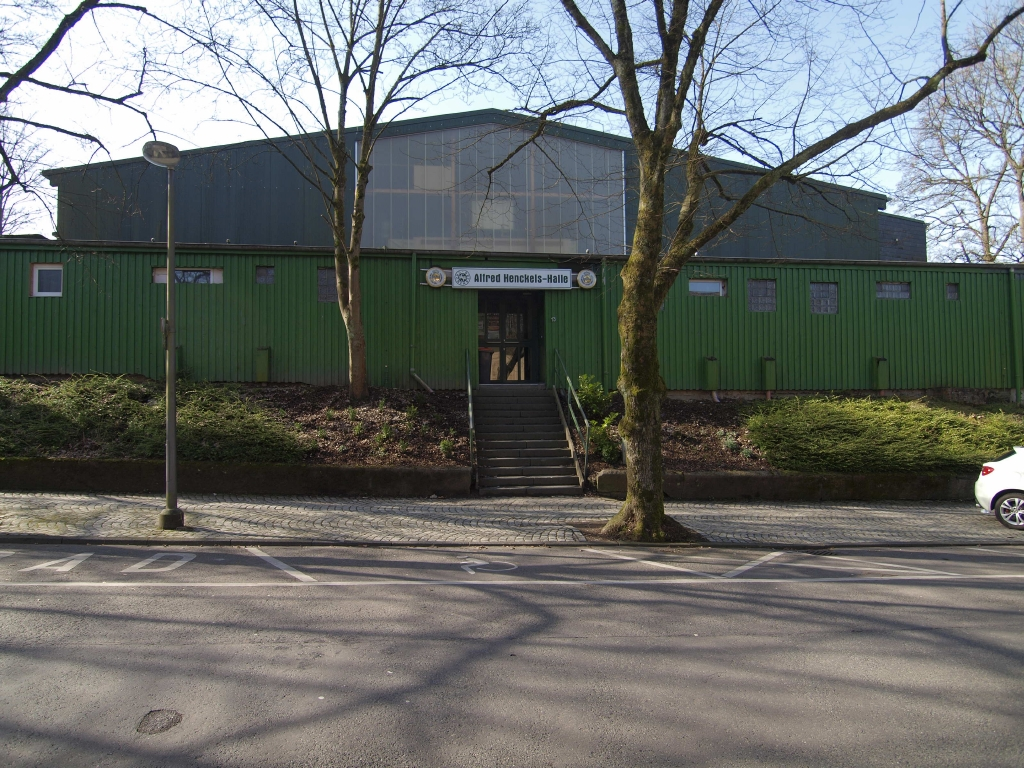 Alfred Henckels-Halle Ringstraße 13. Rollsporthalle des RSC Cronenberg e.V. (Rollschuh-Club Cronenberg) erbaut 1987